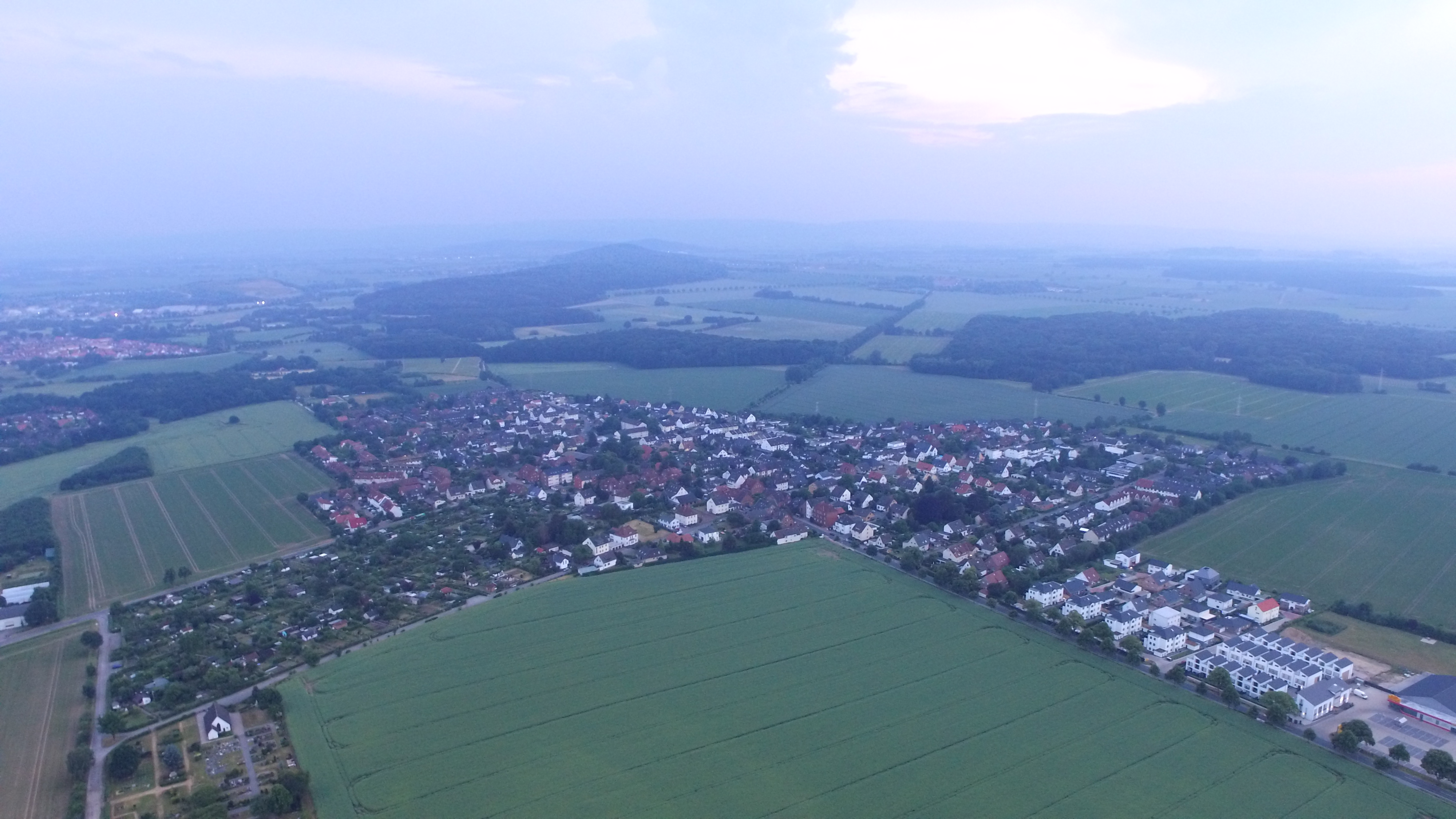 Drone Bild